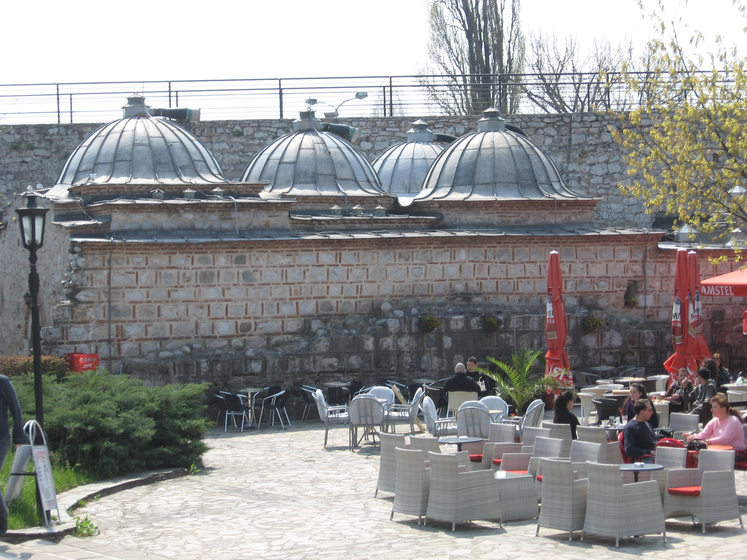 Hamam u Nisu. Snimljeno 10. aprila 2010.